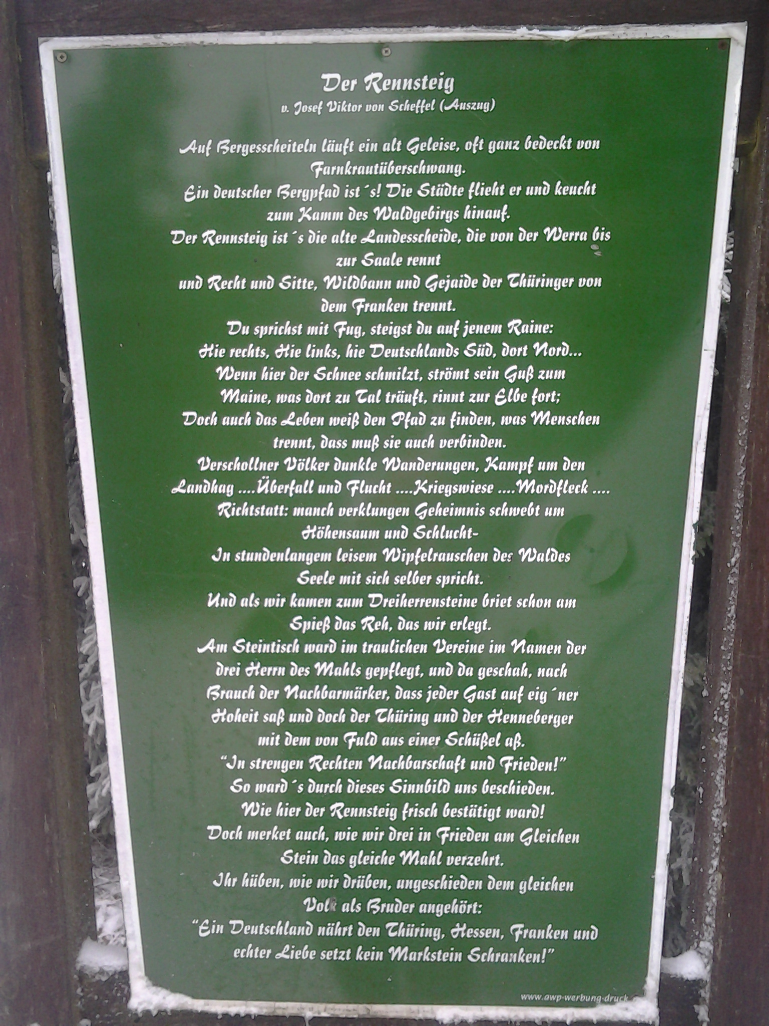 Tafel mit Auszug aus Gedicht "Der Rennsteig" von Josef Victor von Scheffel, Standort: Stein 16 am Rennsteig bei Oberhof (Thüringen)